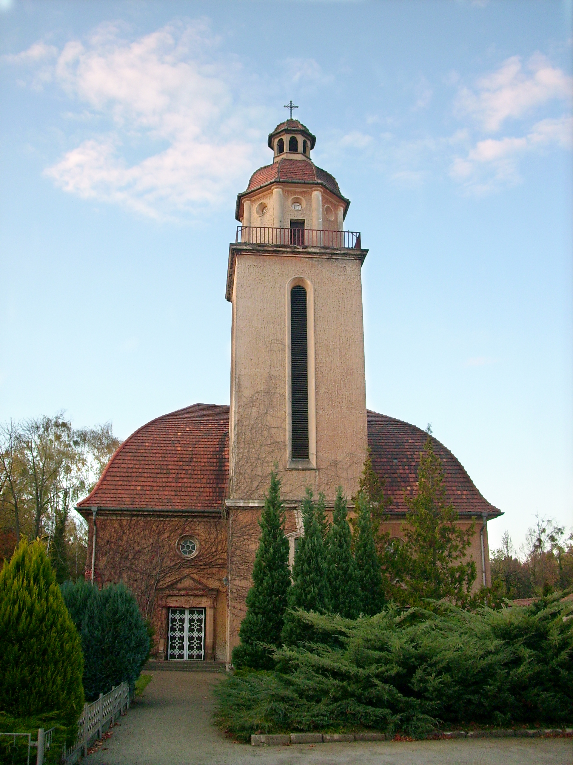 Evangelische Kirche Lauta-Stadt